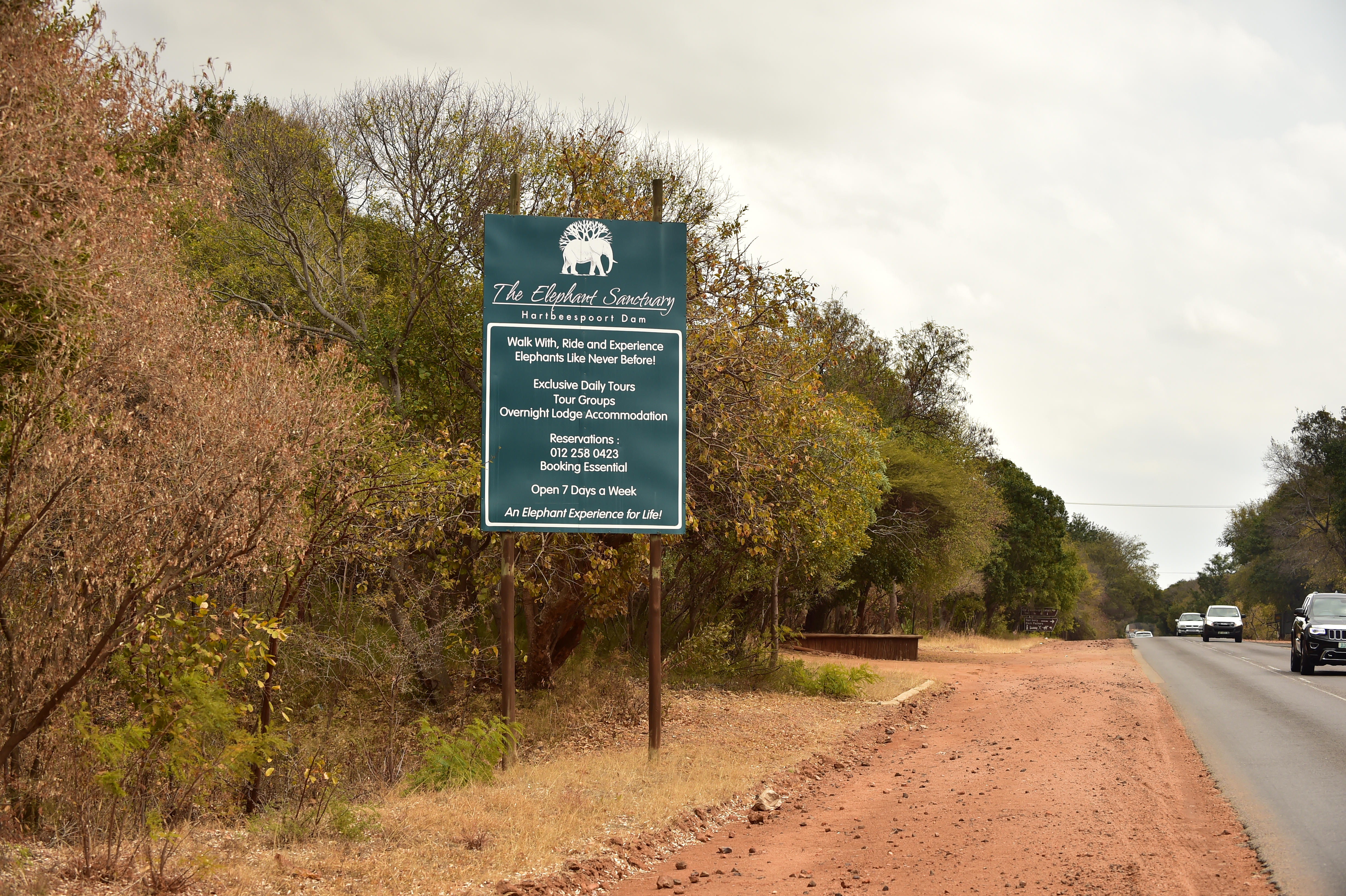 Vue du North West en Afrique du Sud.